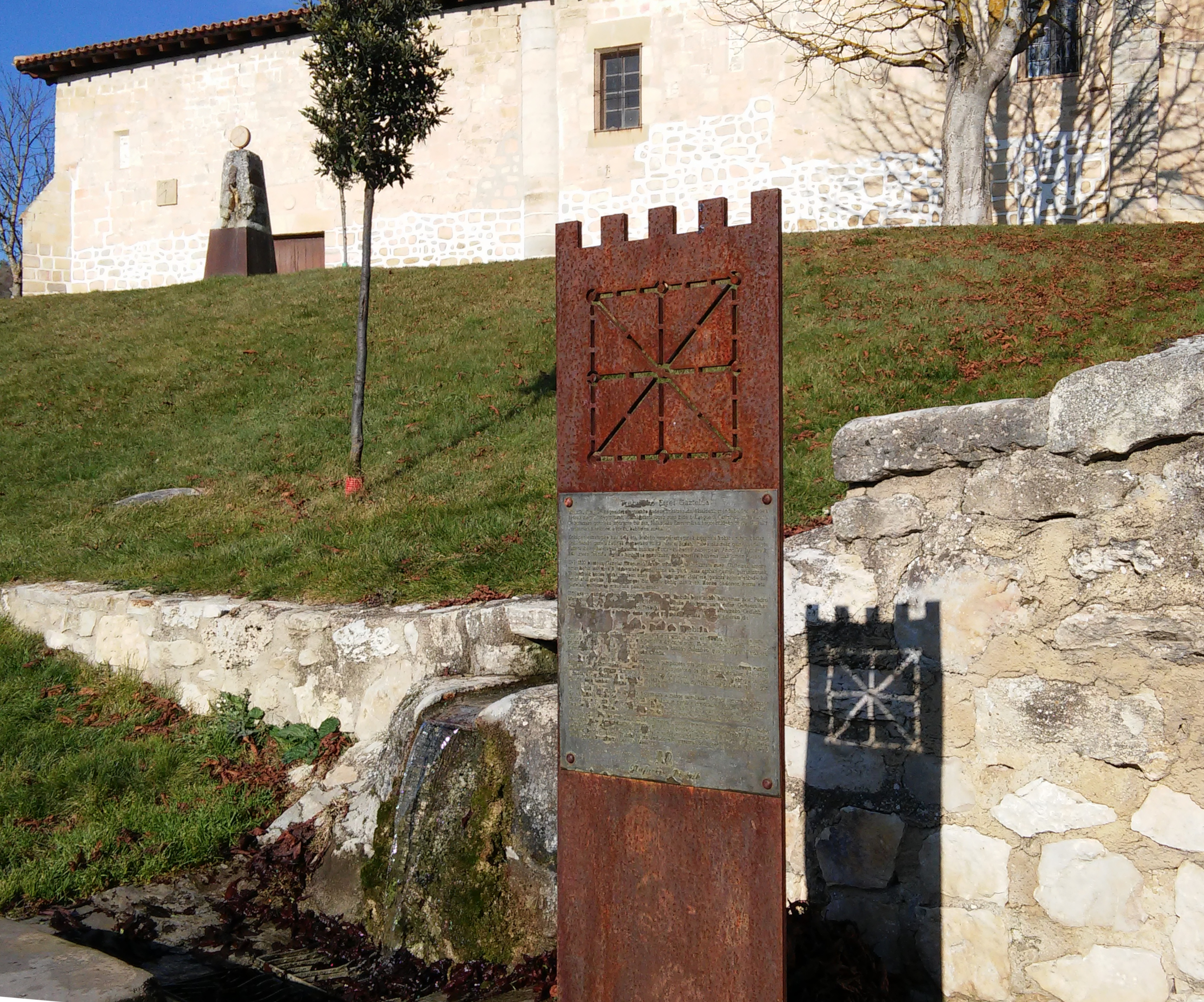 Trebiñun Nafarroako erresumaren muga adierazten duen oroigarria